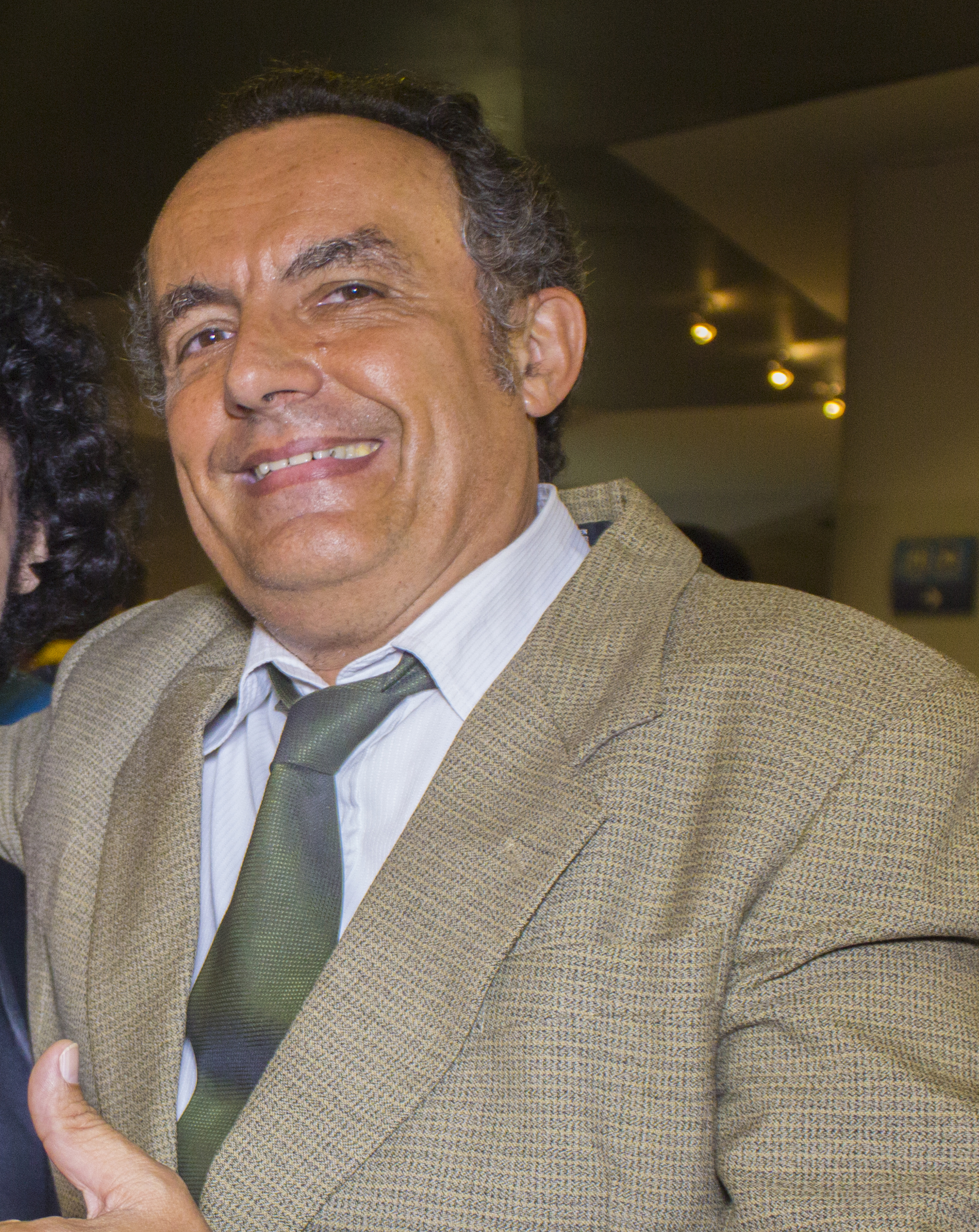 El ufólogo Jaime Rodríguez junto a Felipe Crespo en 2015.